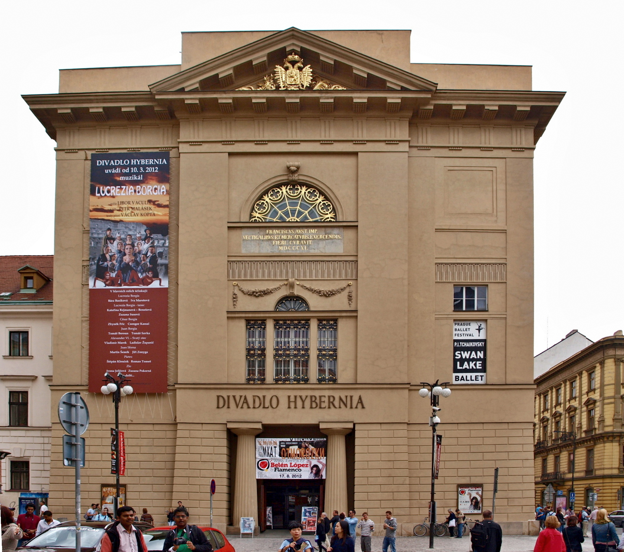 U Hybernů